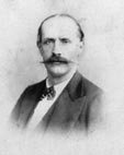 Francisco Javier León y Chiriboga (1832-1880). Het betreft hier een foto waarvan de auteursrechten zijn verstreken. De fotograaf is meer dan 70 jaar dood.